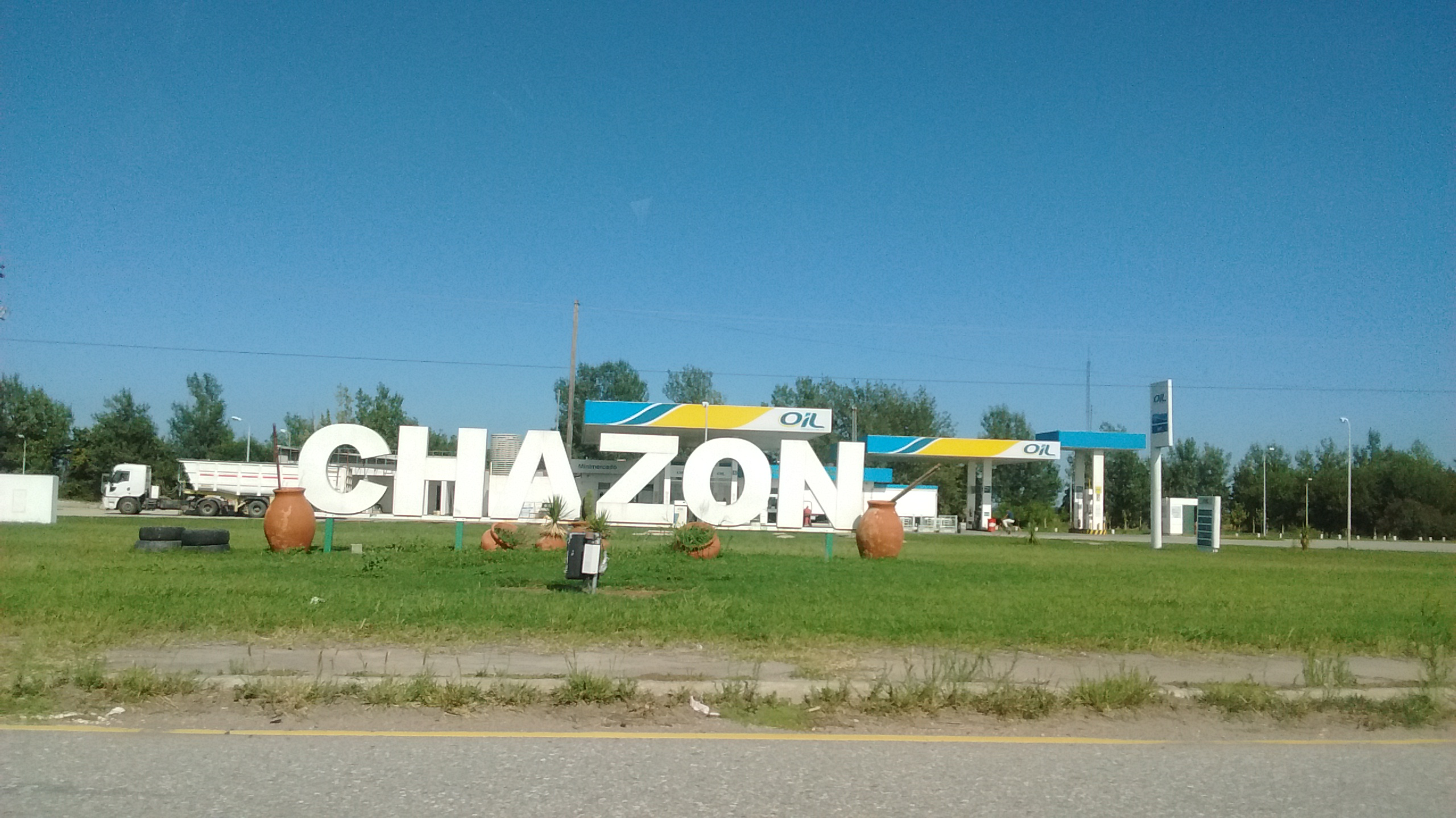 Acceso Chazón, Córdoba